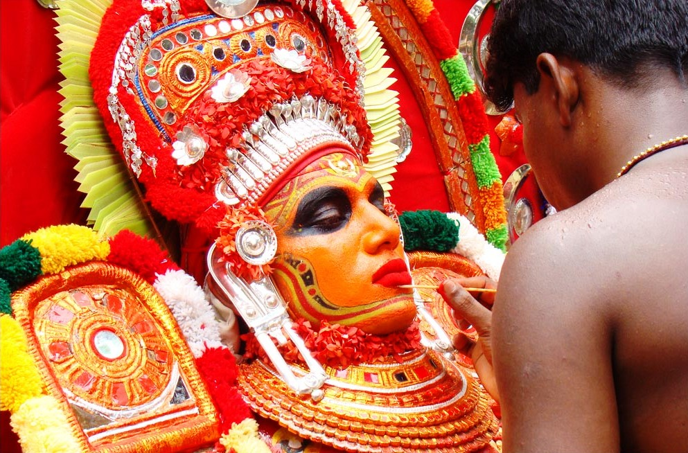 Theyyam makeup